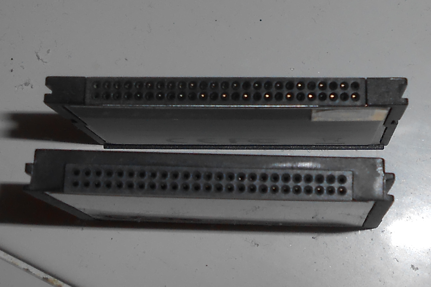 Караты памяти CompactFlash формфакторов тип I (сверху) и тип II (снизу)